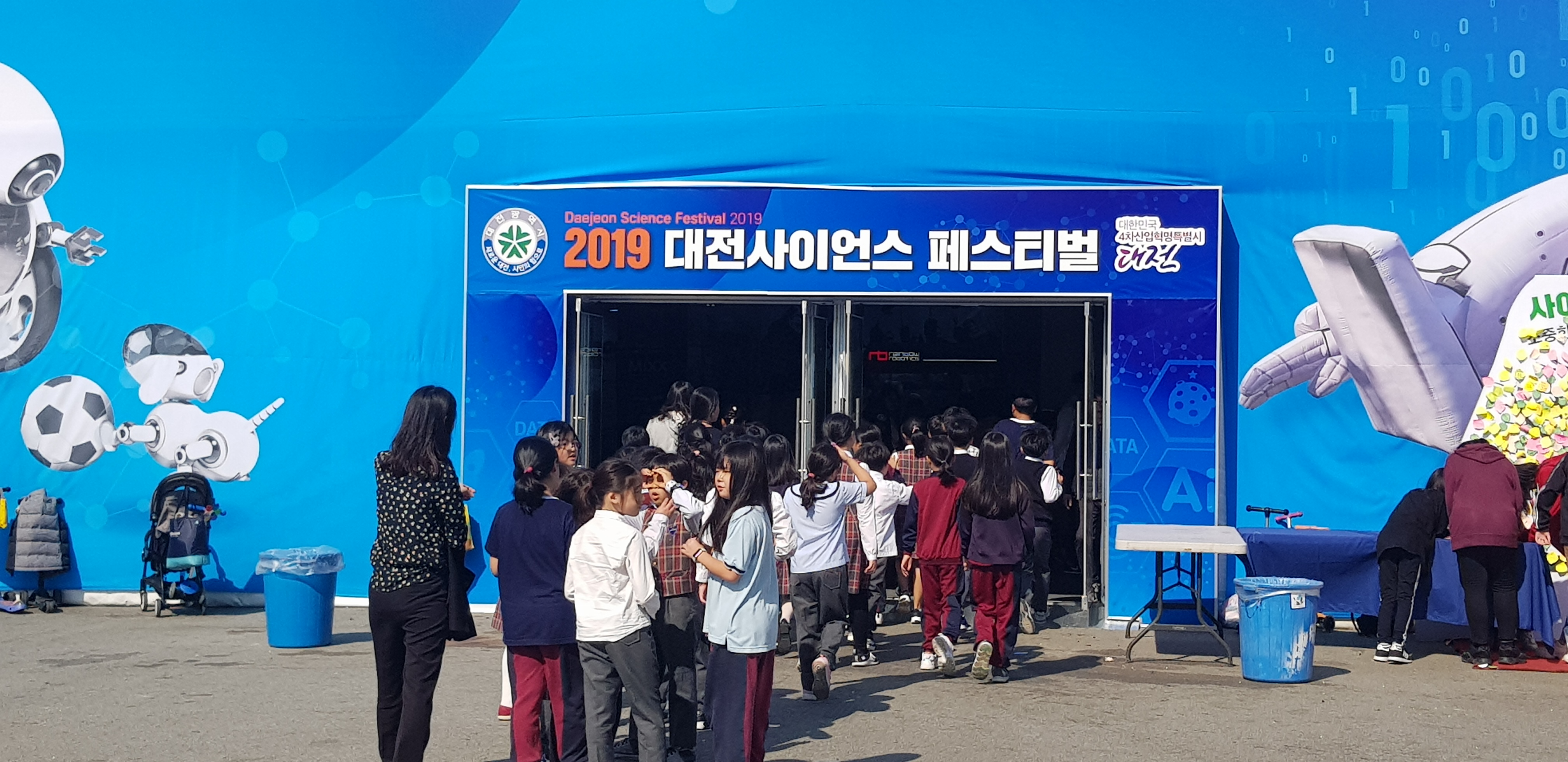 2019 대전사이언스페스티벌 행사장